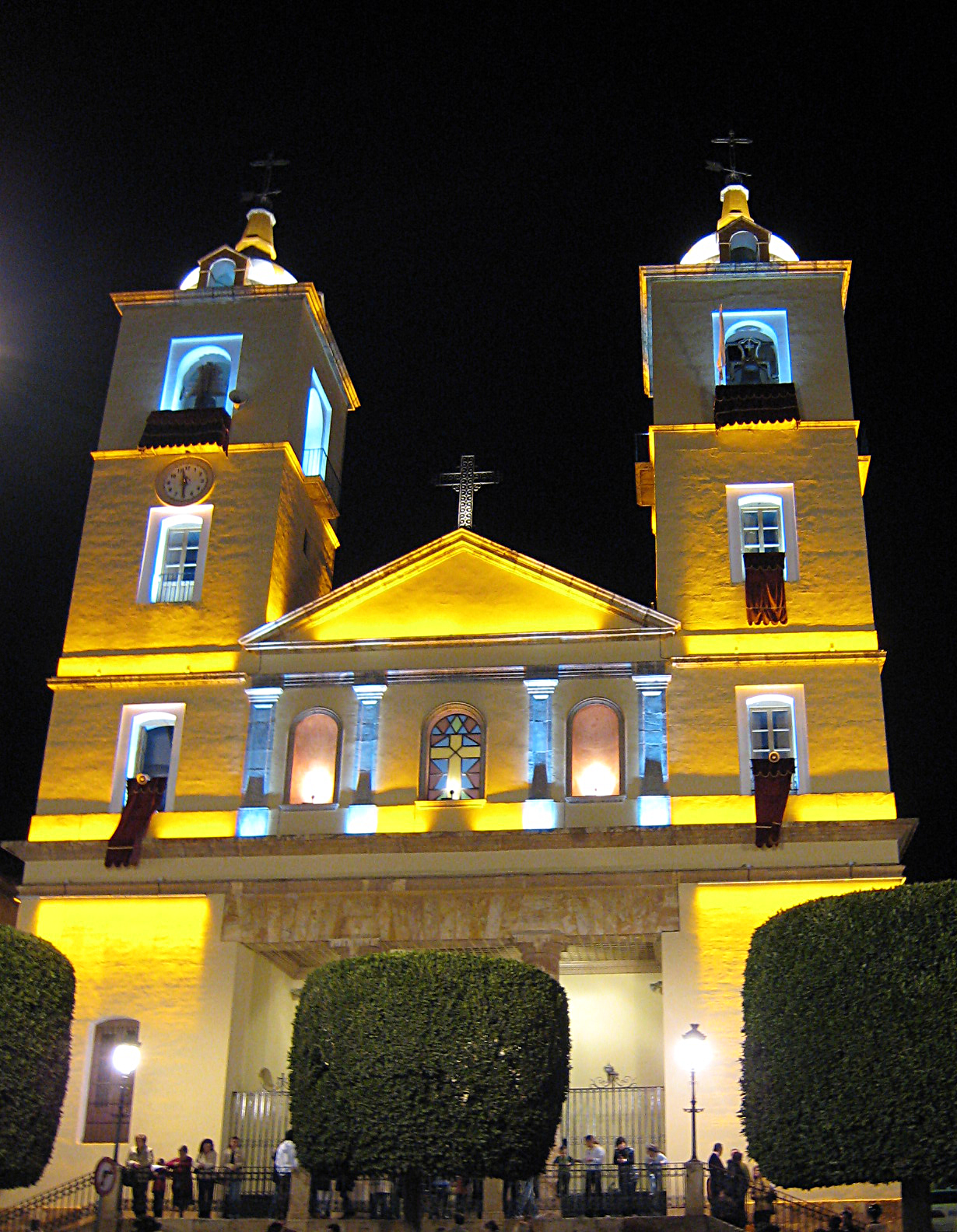 Iglesia de la Anunciación, Berja, de noche